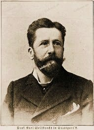 Porträt von Carl Weitbrecht